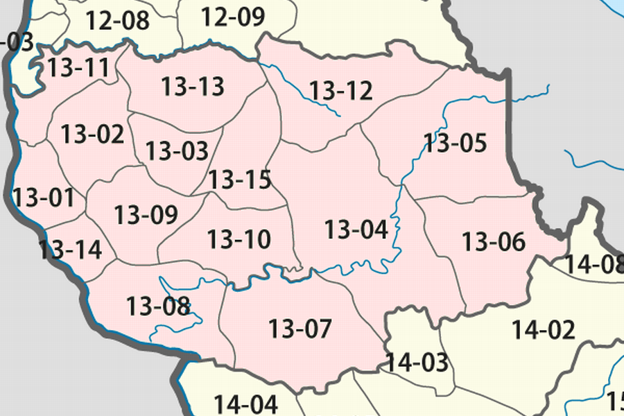 Giấy phép